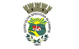 Bandeira da cidade de Oliveira